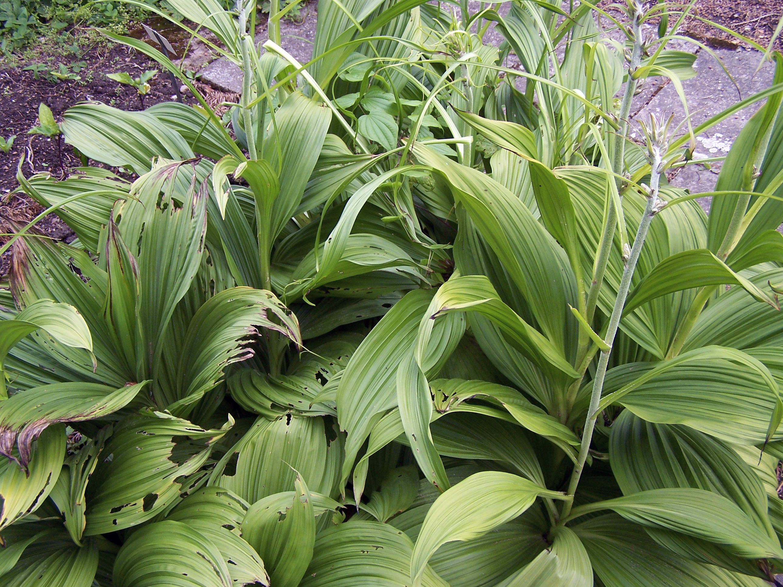 Veratrum nigrum 17 juin 2006 Vieux jardin botanique de Göttingen